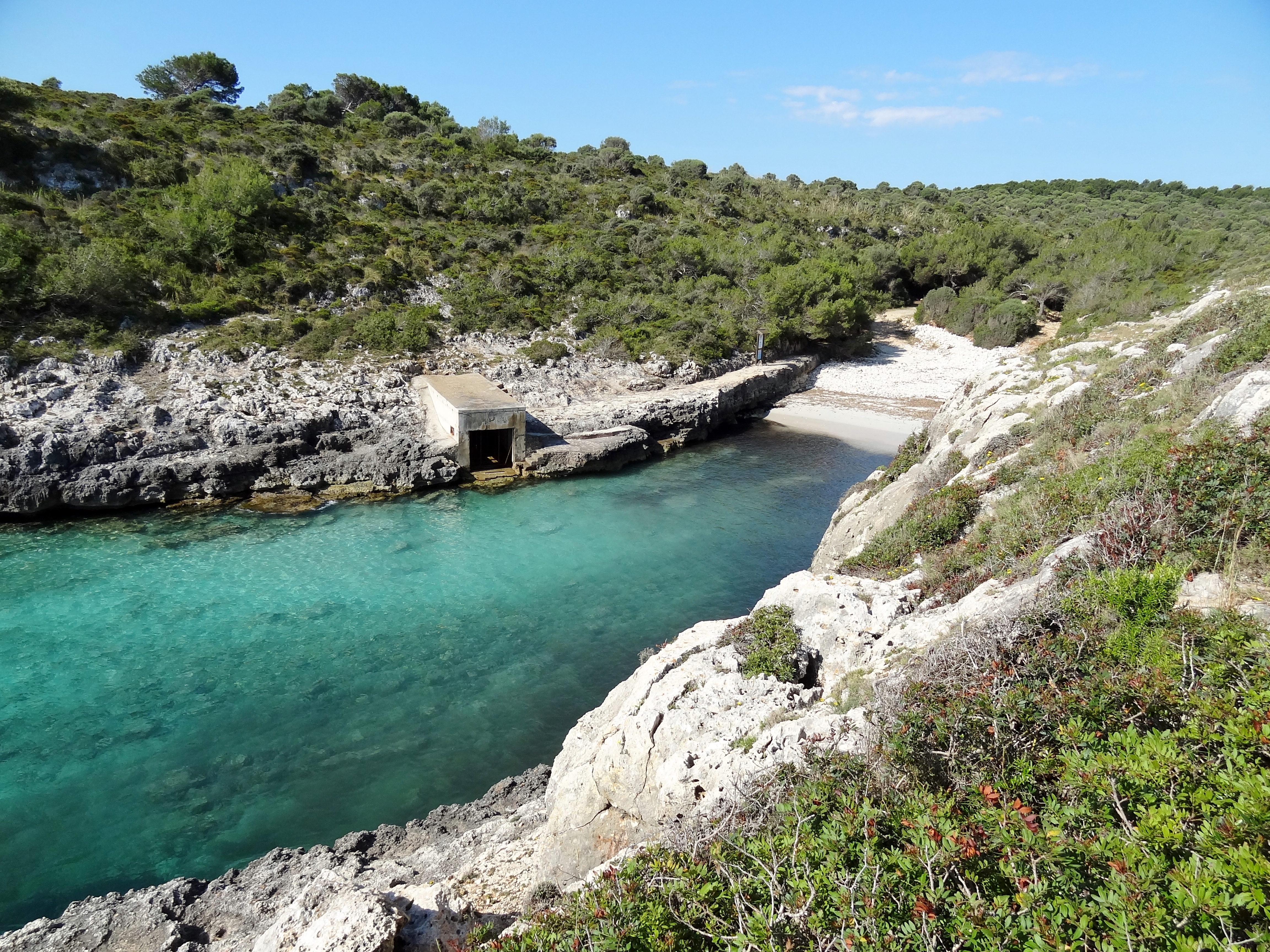 Cala Virgili, Gemeinde Manacor, Mallorca, Spanien